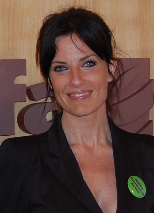 Enrique de Santiago, Cristina Seguí y Juan Antonio Martín Mesonero